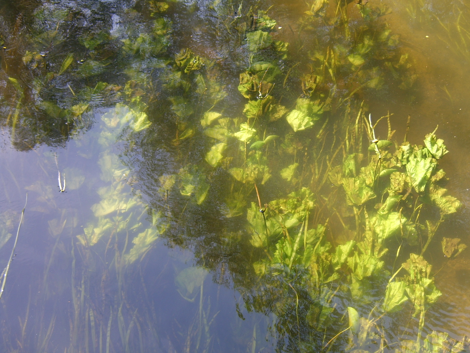 Roślinki w nurcie Orzyszy